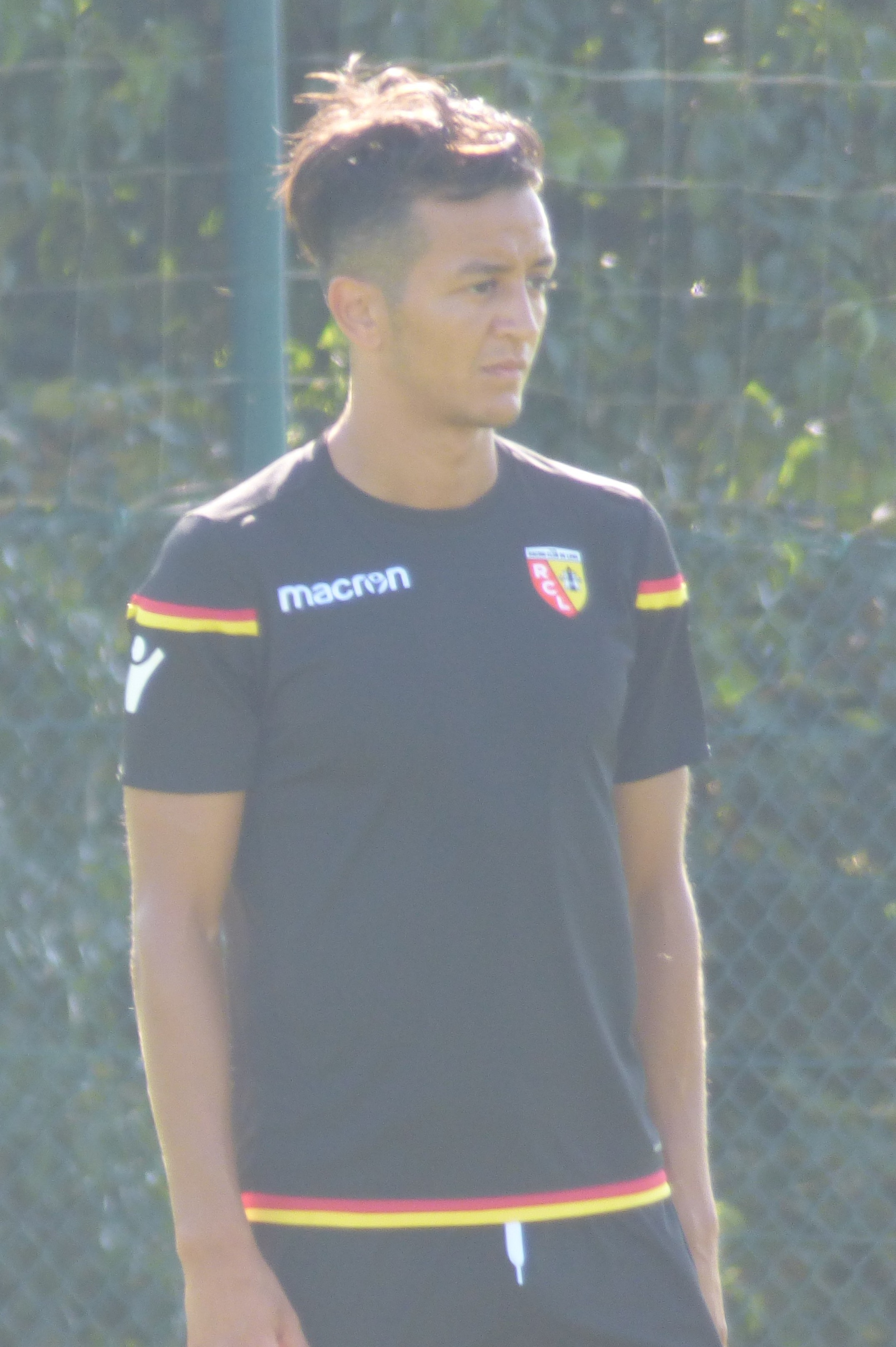 Mouaad Madri lors d'un entraînement public du Racing Club de Lens, le 2 août 2018, au Centre technique et sportif de La Gaillette à Avion.